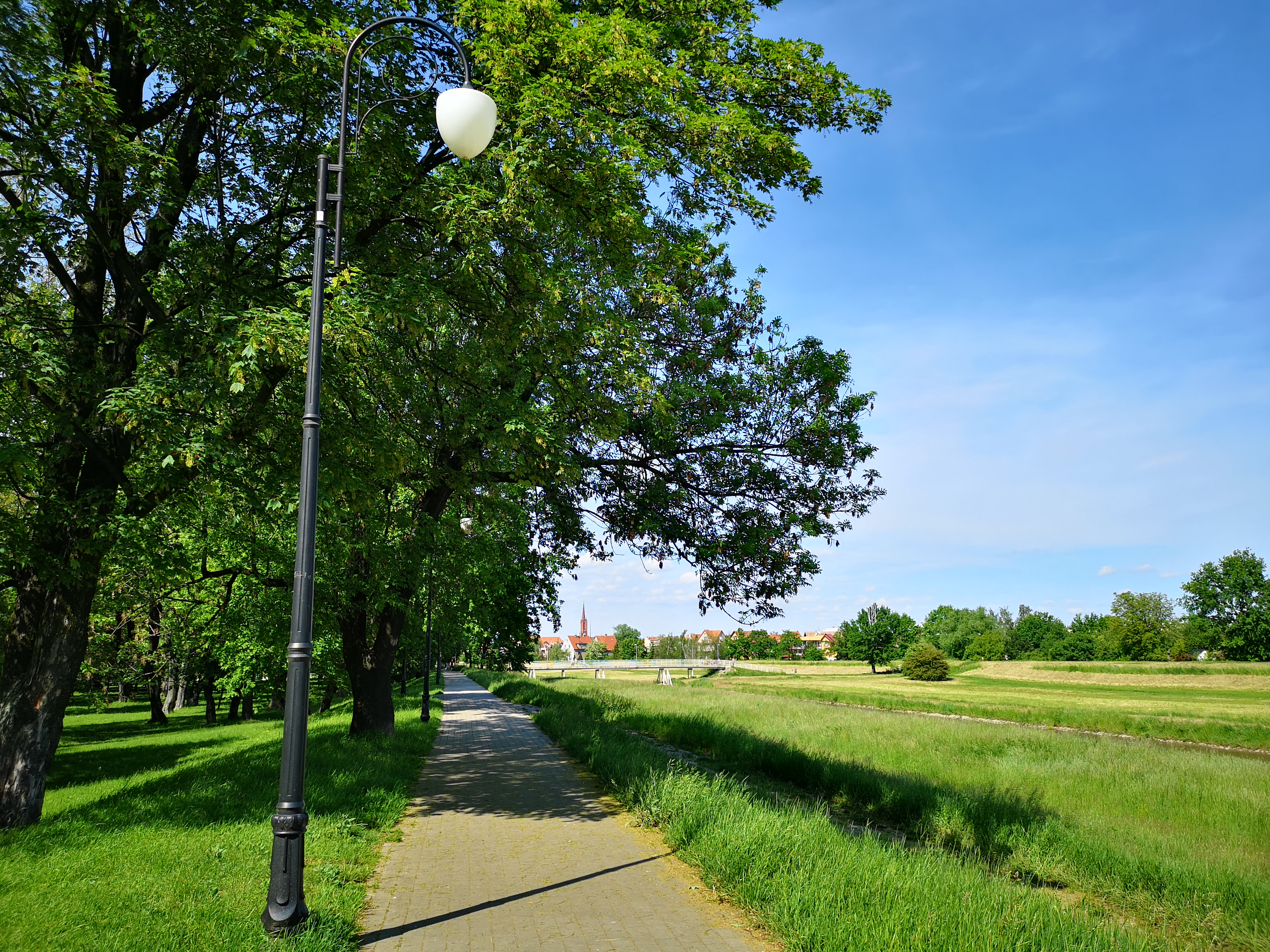 Droga spacerowa wzdłuż wału nad Kaczawą we wschodniej części legnickiego parku.